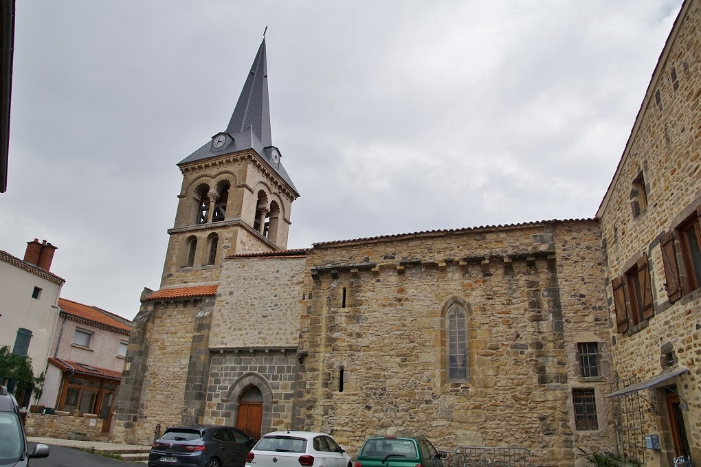 Puy de Dôme